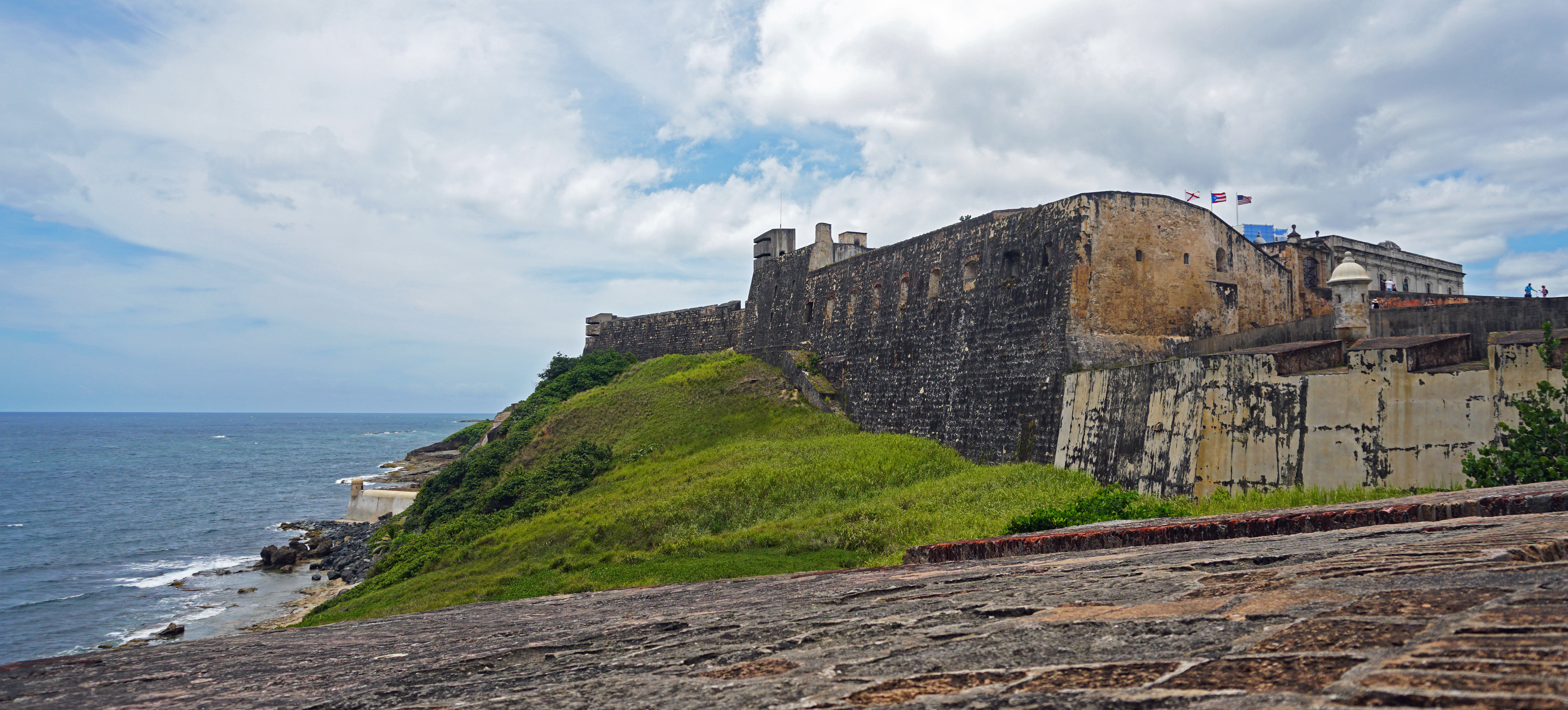 Vista panorámica del Castillo San Cristóbal, Viejo San Juan, Puerto Rico